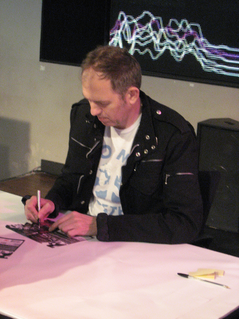 Anton Corbijn - Control